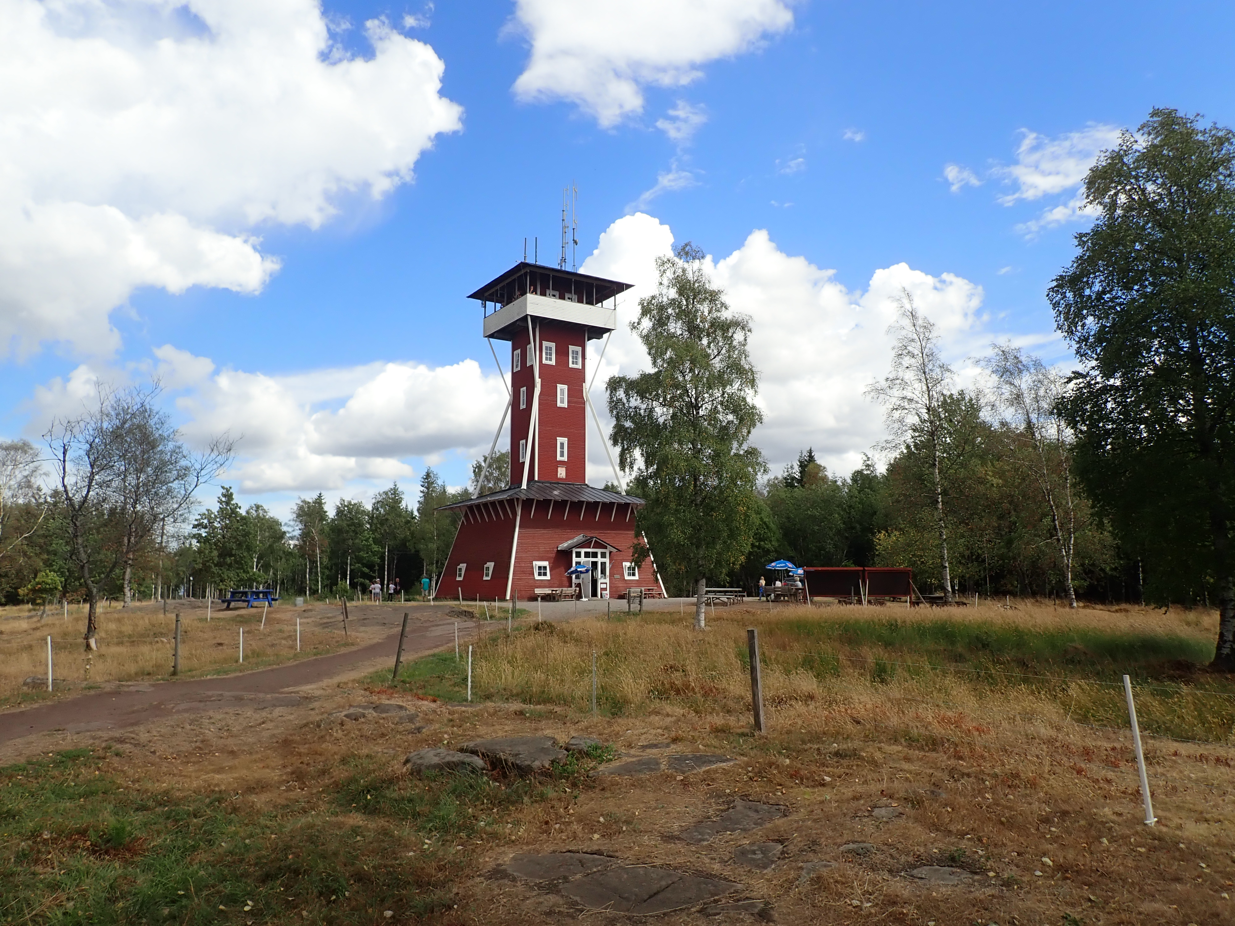 Utsiktstornet, Kinnekulle. Invigt 1983 på platsen för det gamla från 1892 som brann ned 1982.